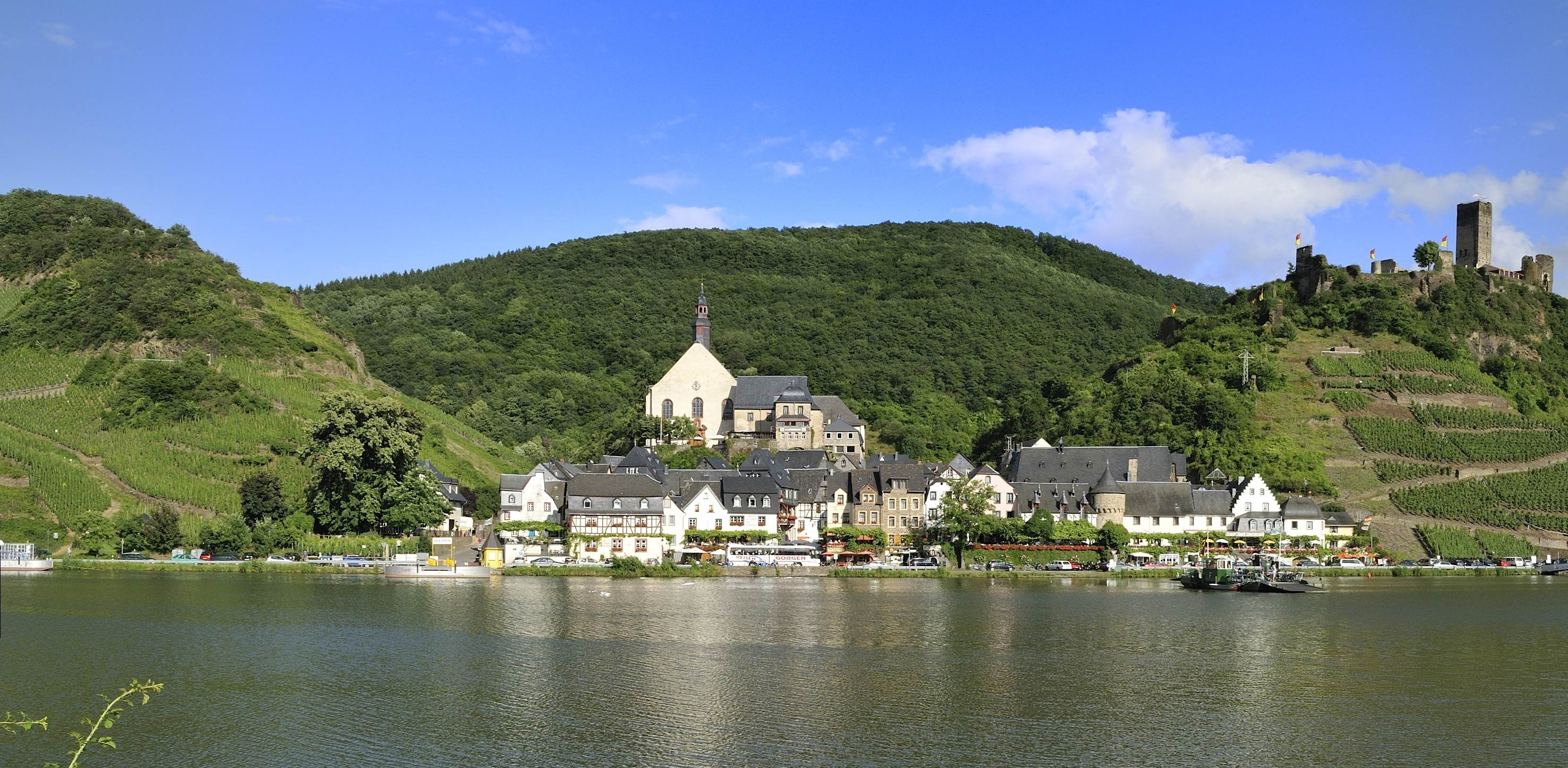 Ortsansicht auf Beilstein an der Mosel von dem gegenüberliegenden linken Flussufer